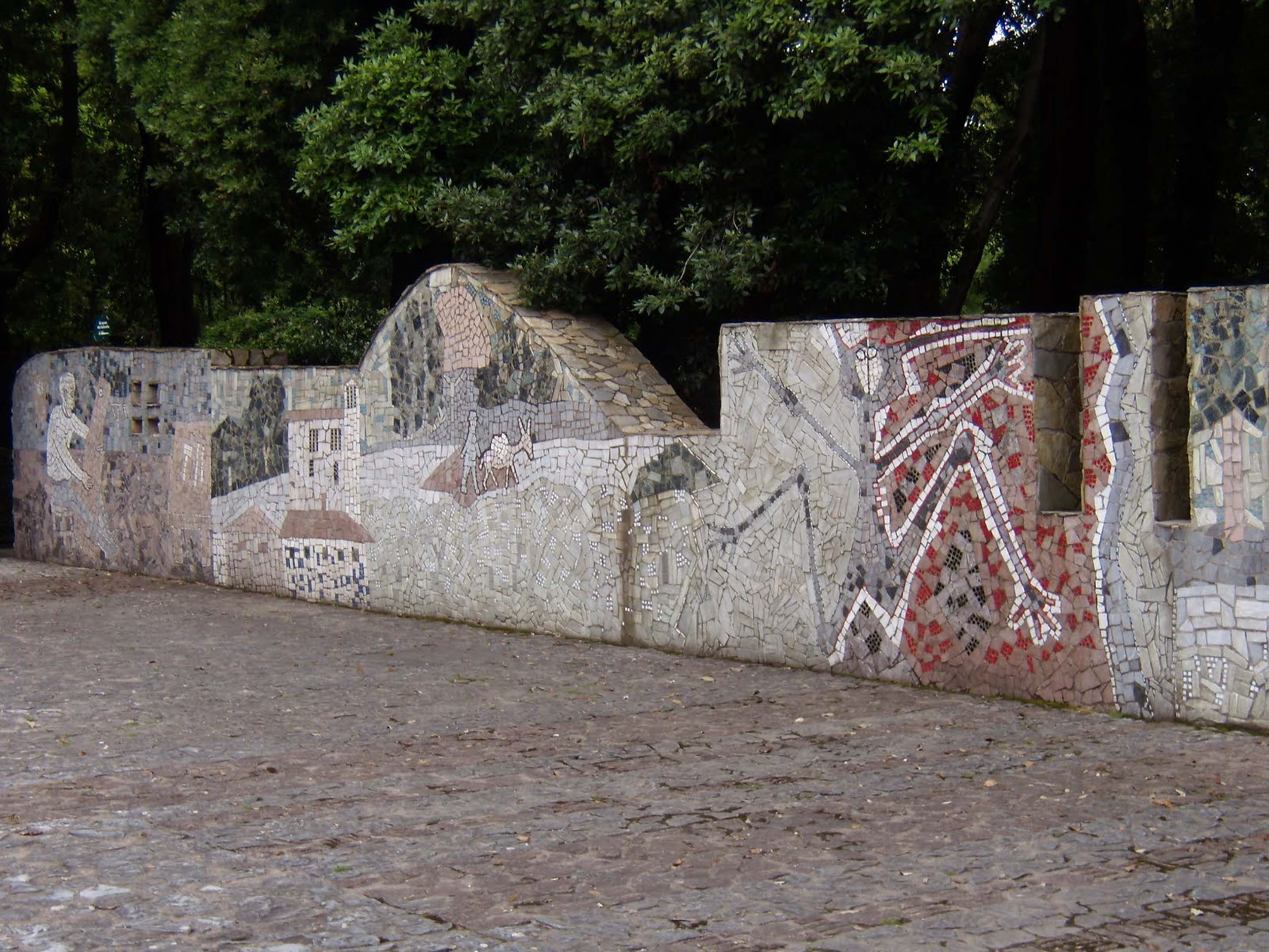 mosaico